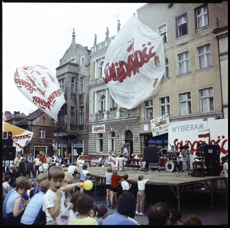 Festyn wyborczy na rynku w Tczewie. Na scenie z gitarą Antoni Filipkowski.